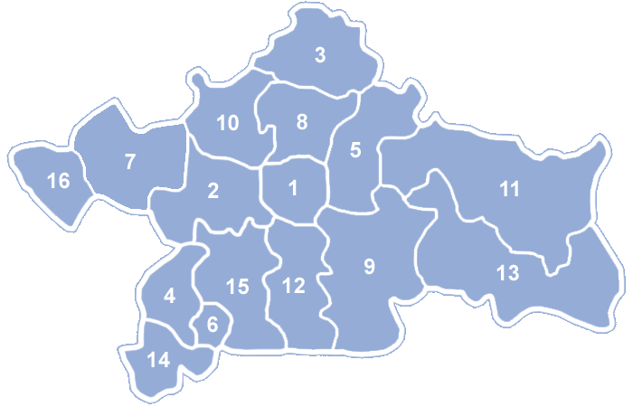 Gminy powiatu białostockiego.